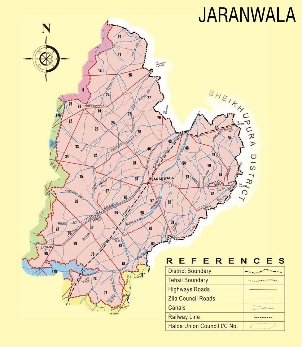 پنجابی: تحصیل جڑانوالا دیاں یونین کونسلاں